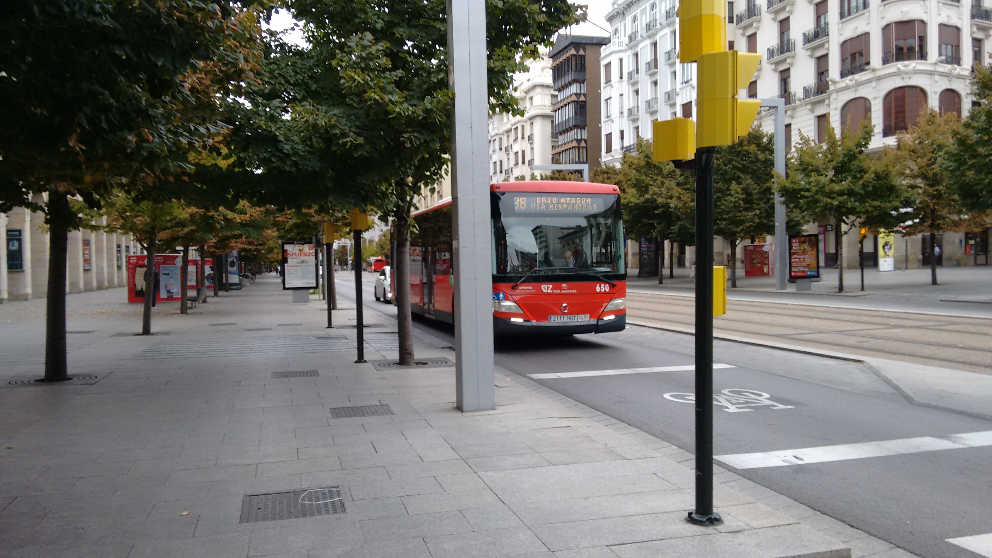 Imagen del Paseo de la Independencia, un bus prestando servicio, tomada el 17/09/2016.